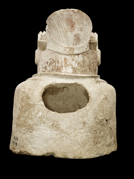 Dama de Elche (Cultura Ibérica). Número de inventario: 26207.